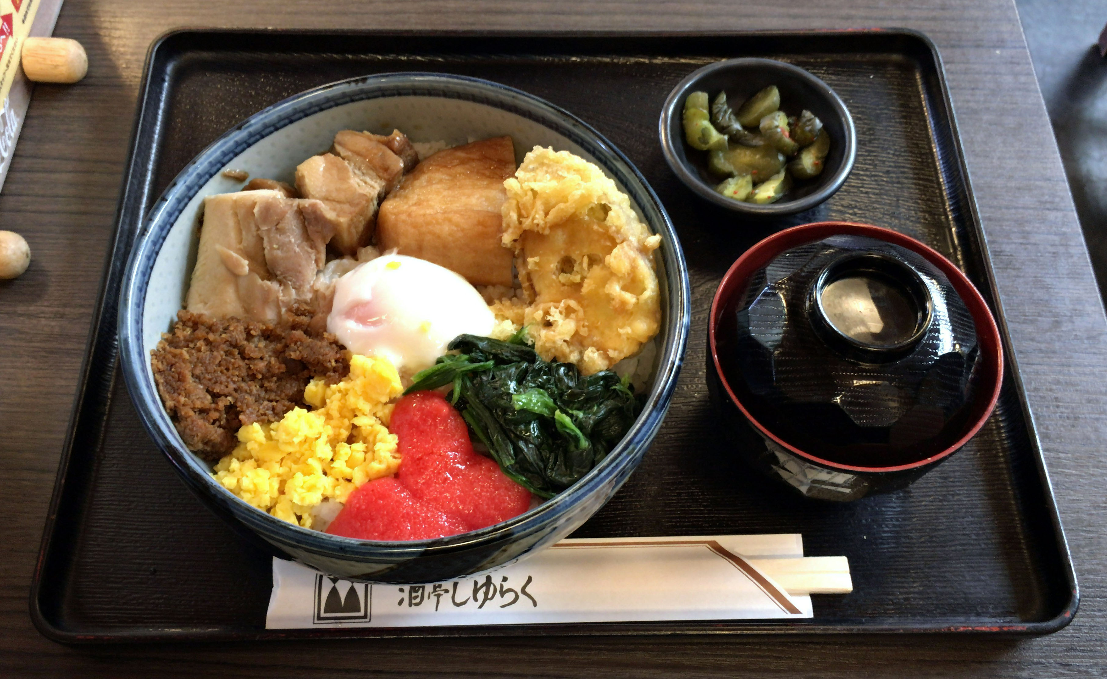 酒亭じゅらく 西郷丼（1320円）